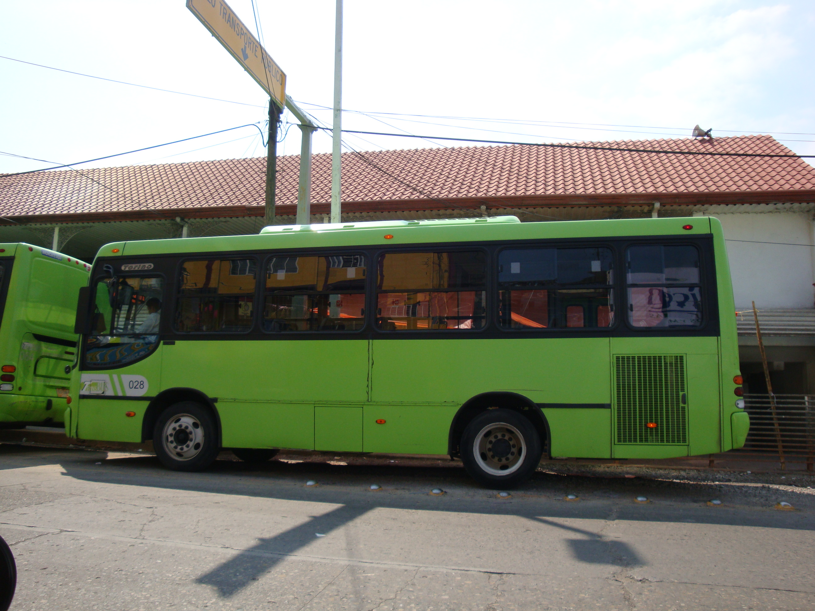 Autobús de Transporte Urbano denominado "Transbus" Que Funciona En la ciudad de Villahermosa, Tabasco, México.